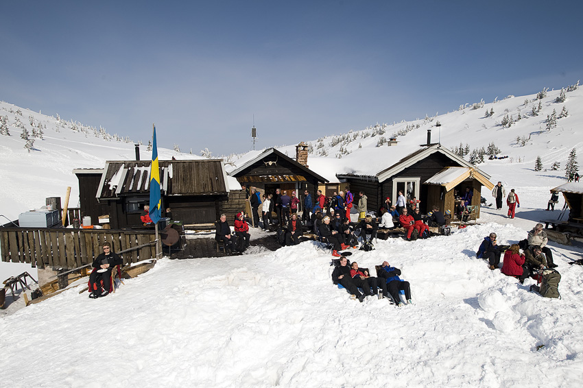 Storfjällsgraven Sälen toppstuga restaurang